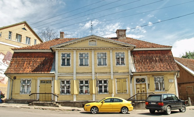 Baznīcas iela 7, Kuldīga